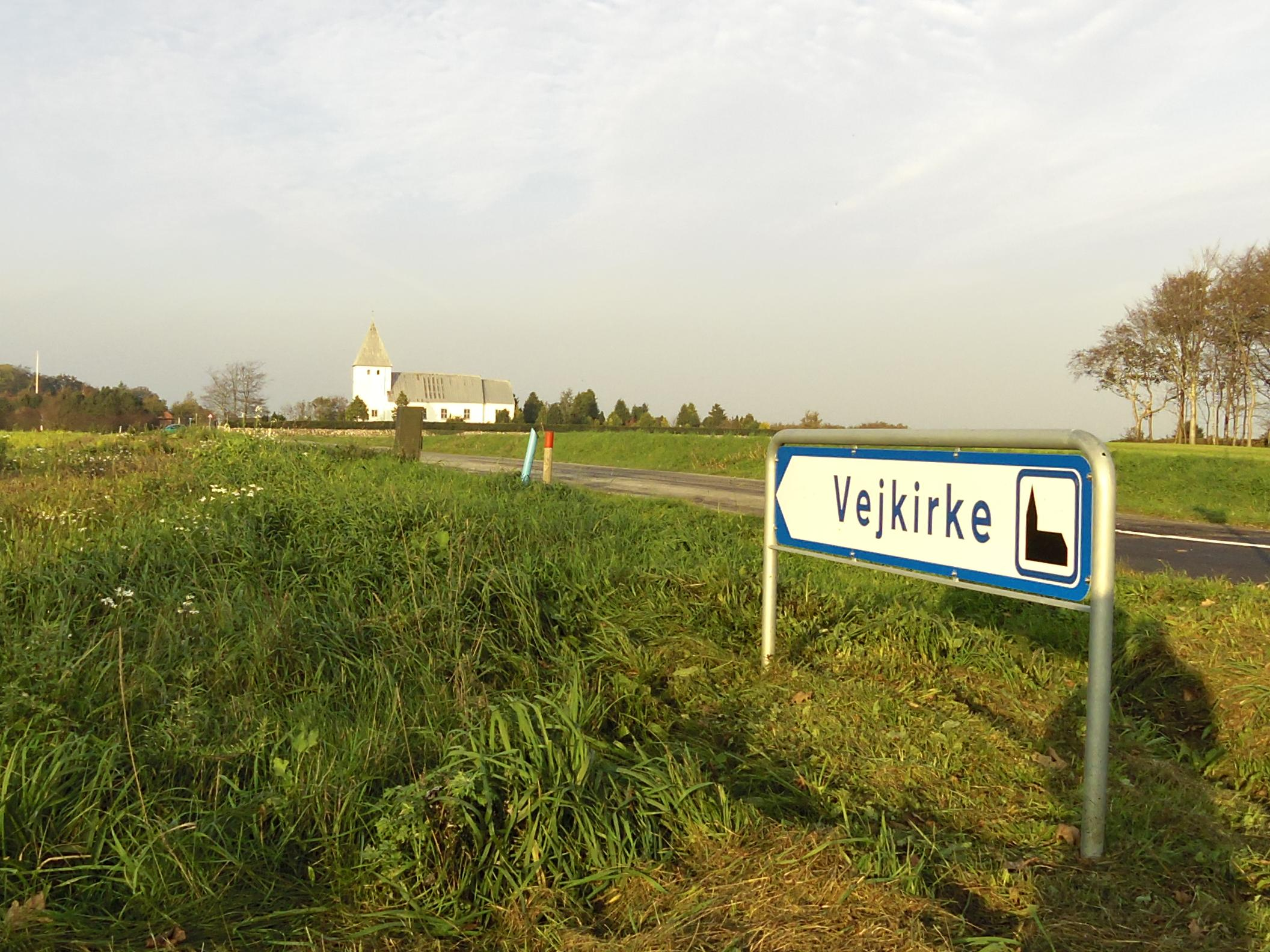 Skilt til kirken ved Højrup